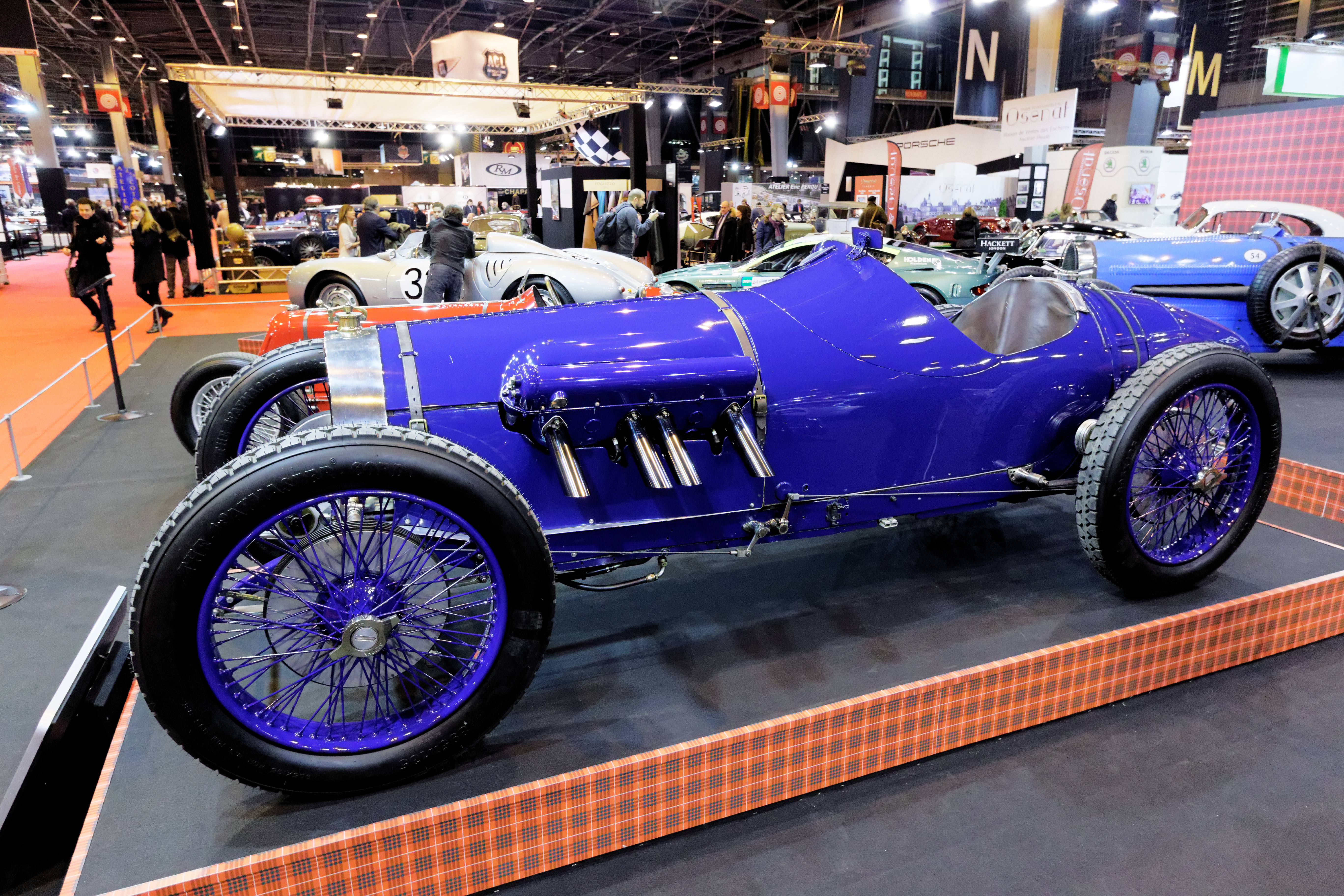 Une des voiture présentée lors du salon Rétromobile de Paris 2015